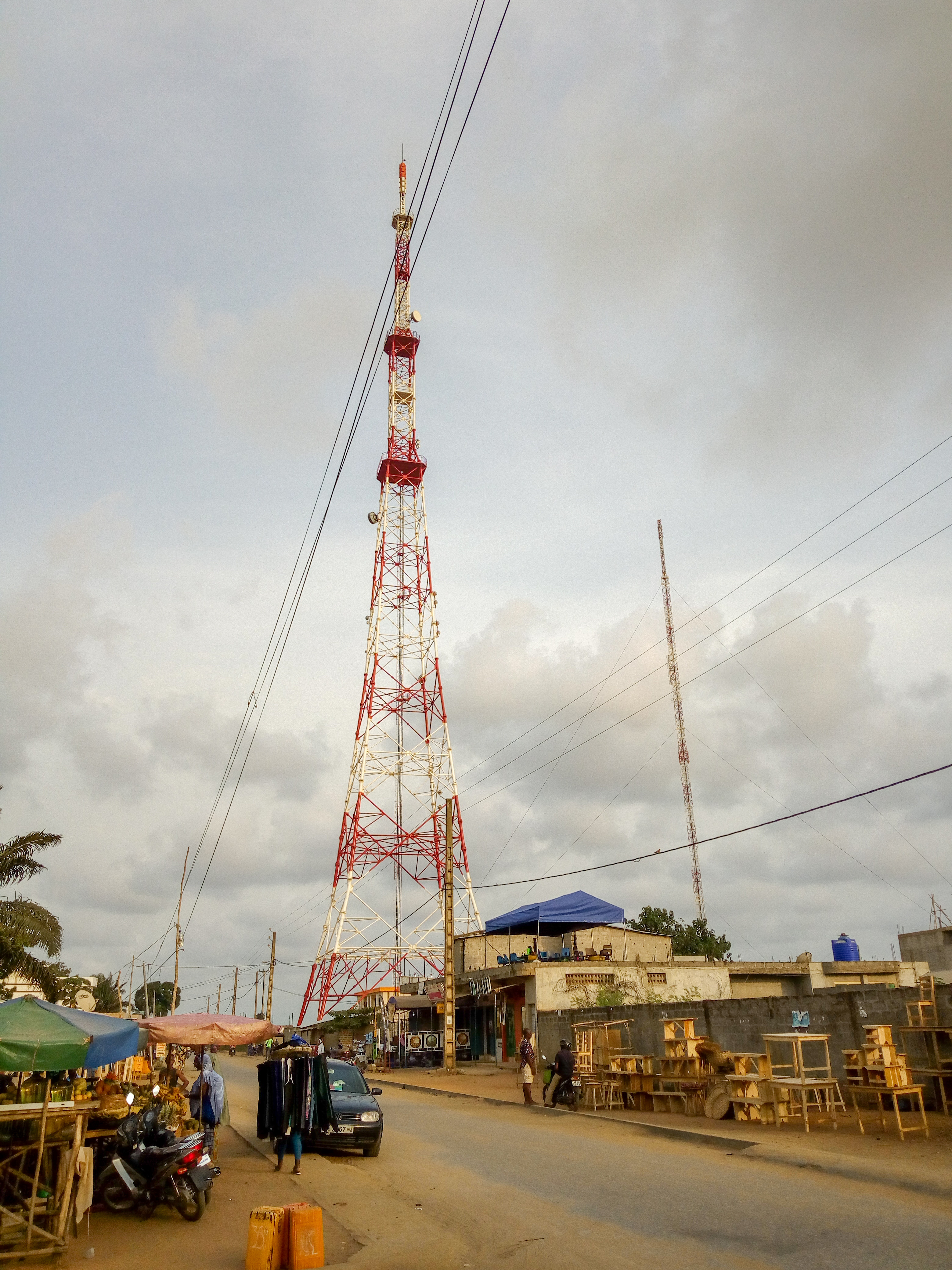 Pylône de radio diffusion de l'ORTB installé à Abomey-Calavi au Bénin pour féliciter la diffusion dans un processus de couverture nationale